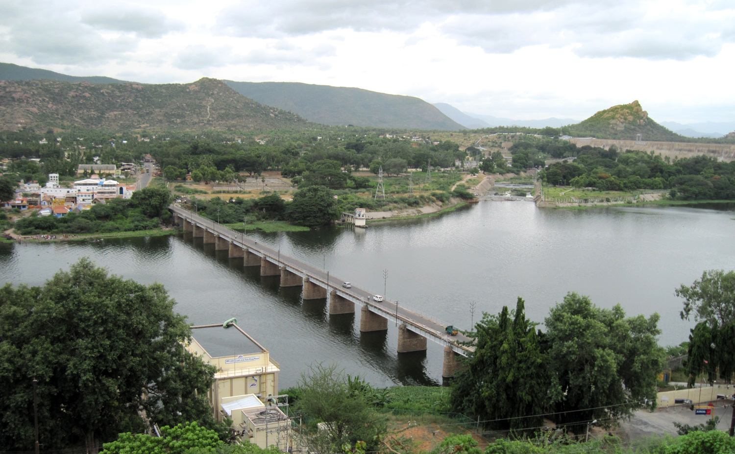 இந்தியாவில் உள்ள மிகப்பெரிய அணைகளில் ஒன்று. சேலம் மாவட்டத்தில் உள்ளது